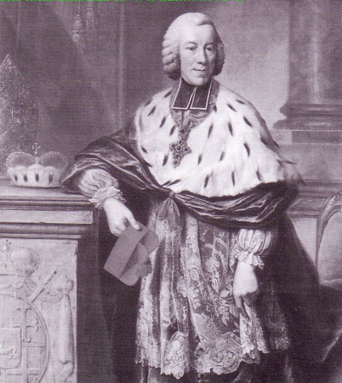 Ausschnitt aus einem Gemälde von Anton Joseph Stratmann: Wilhelm Anton von der Asseburg (1707-1782) war von 1763 bis 1782 der 52. Bischof des Fürstbistums Paderborn.